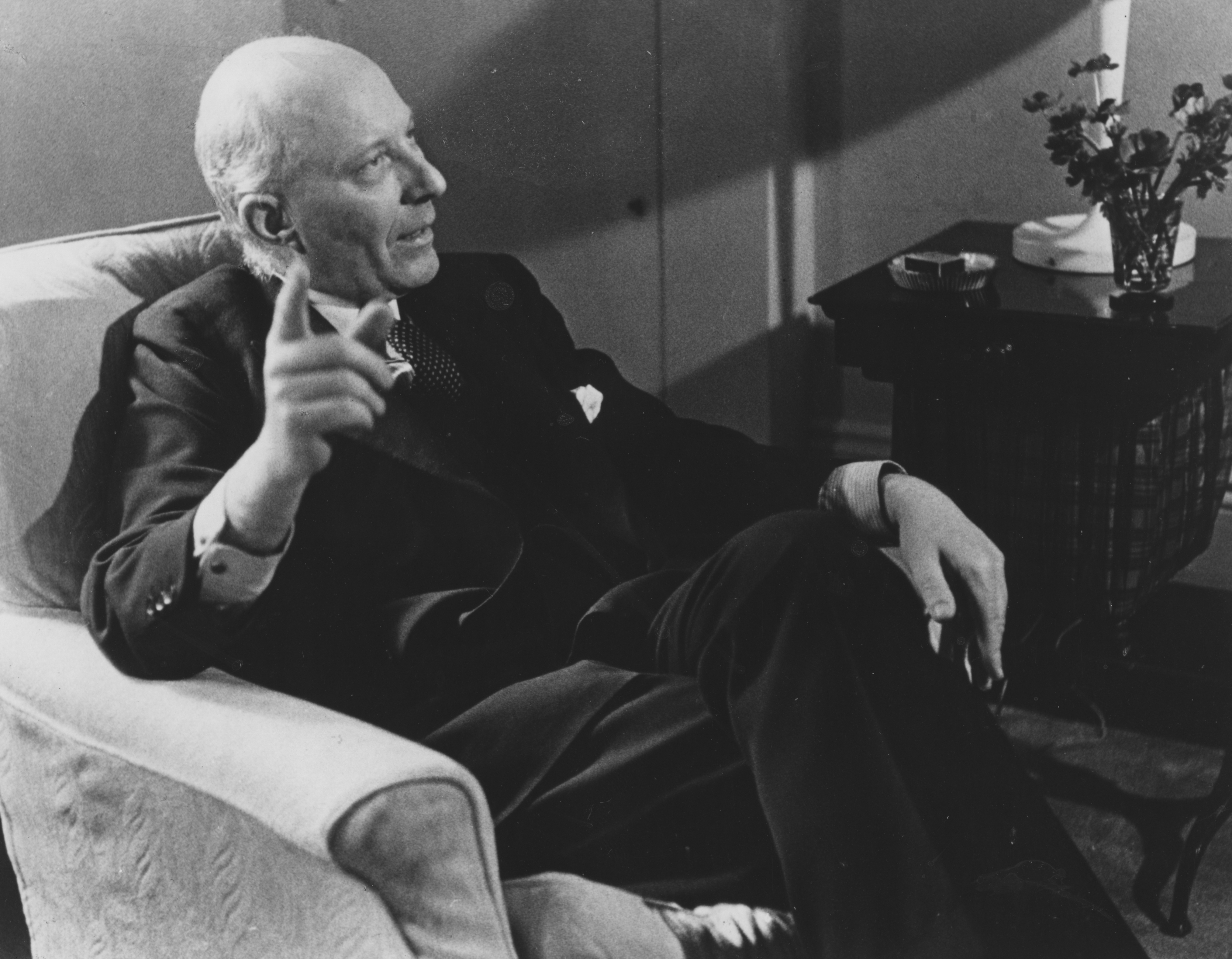 IMAGELIBRARY/110 Persistent URL